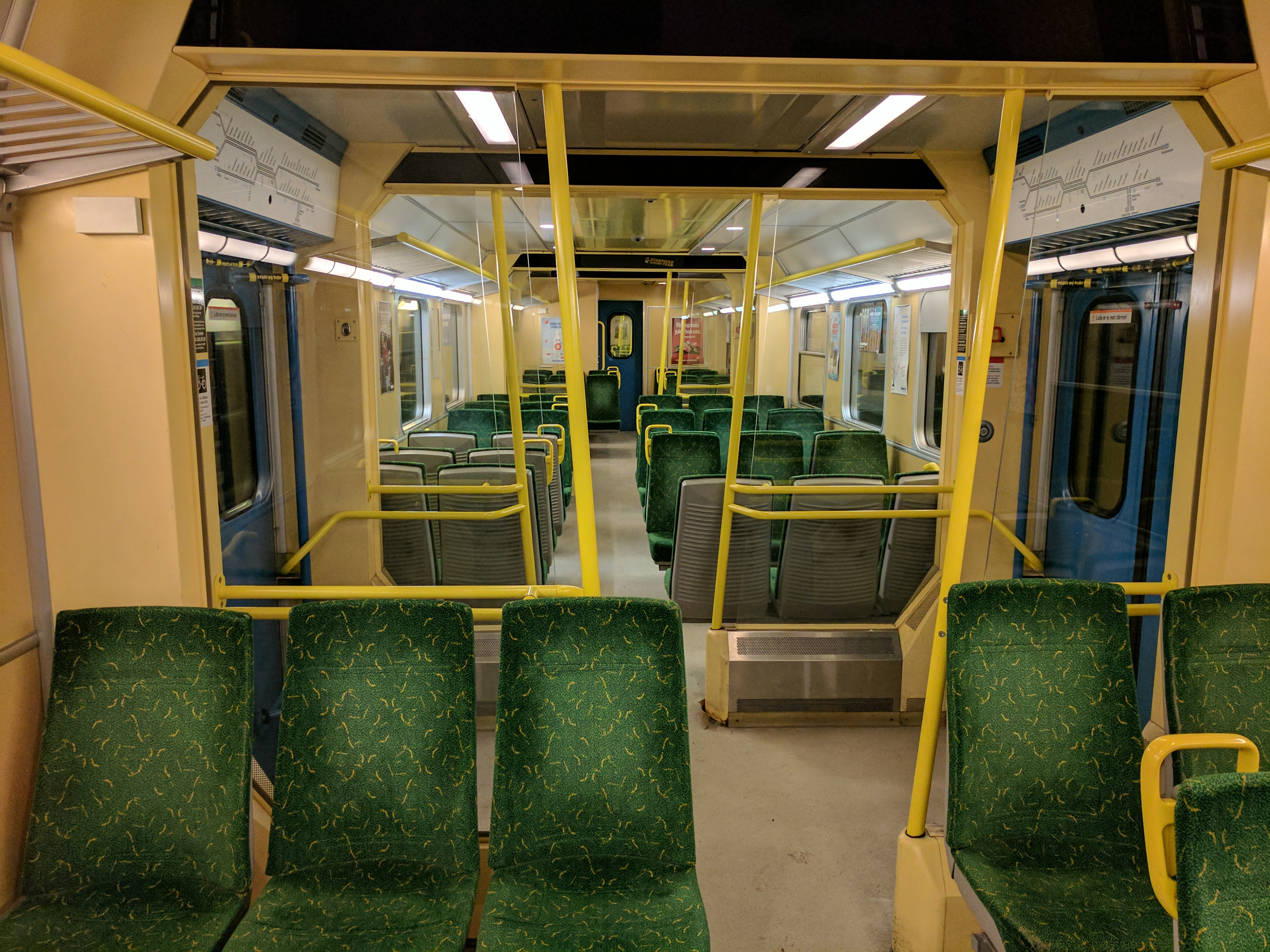 Inside X10